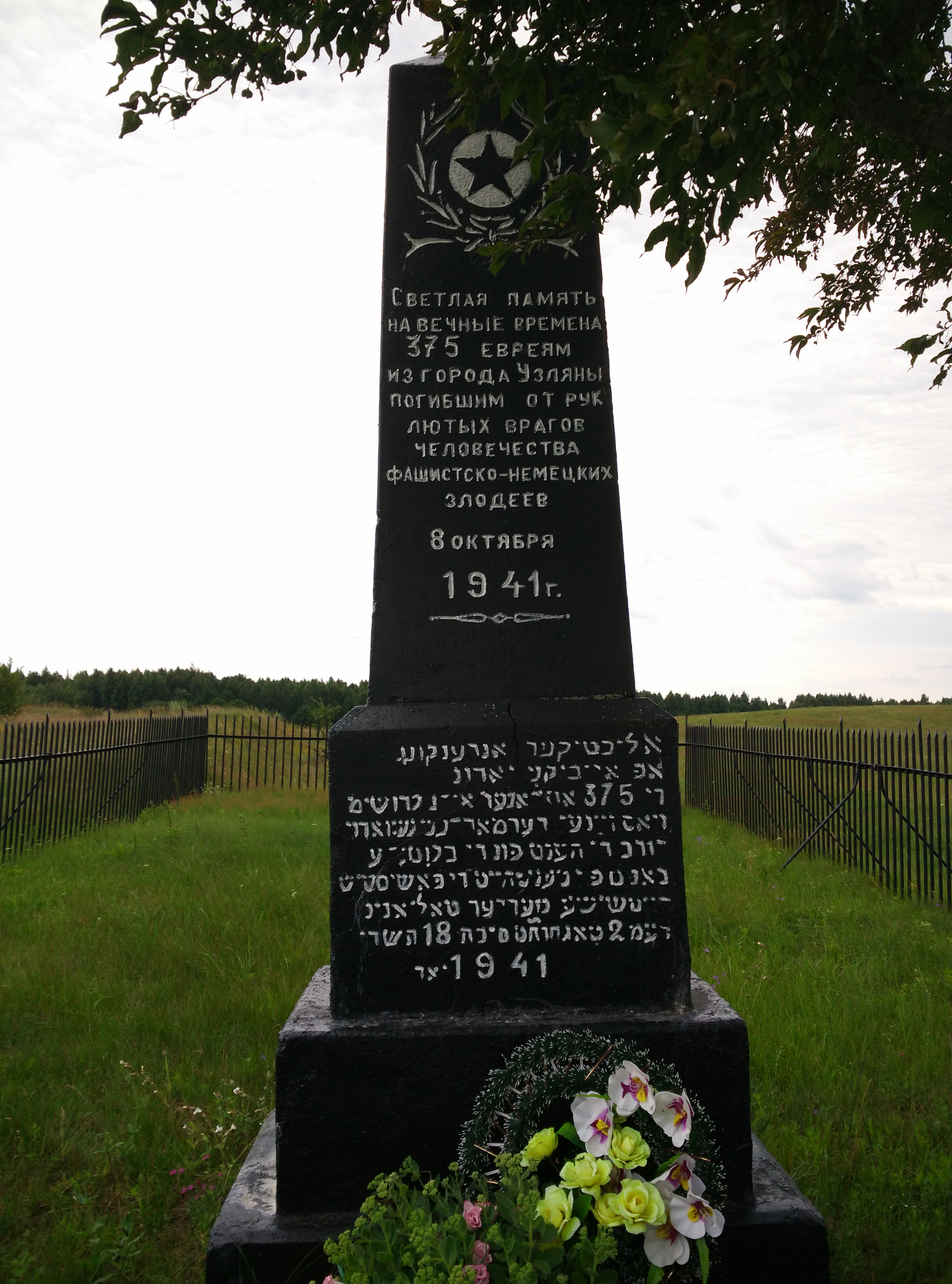 Вёска Узляны, Пухавіцкі раён.